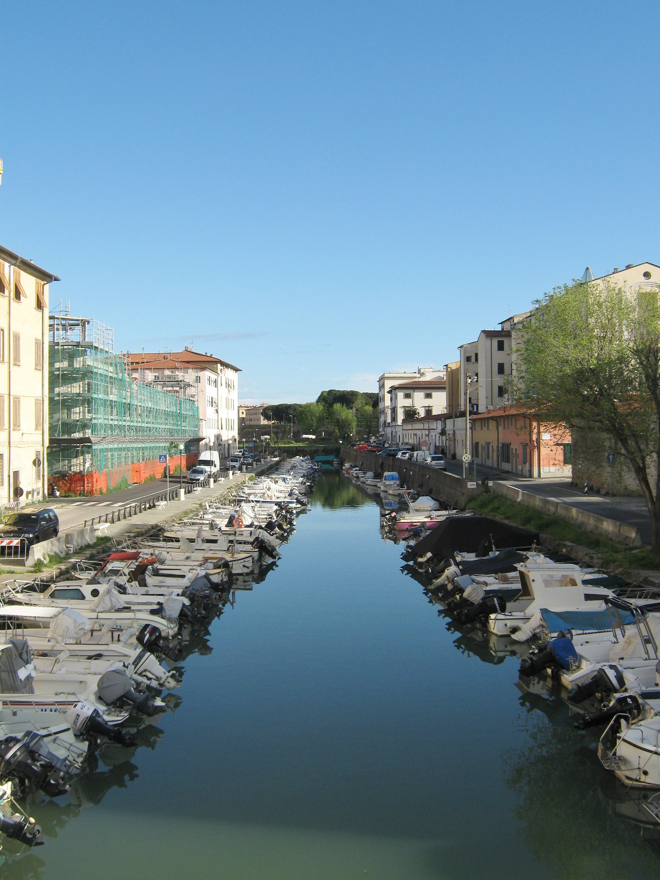 Livorno: veduta del Canale dei Navicelli dalla passerella metallica situata presso la Dogana d'acqua. Sullo sfondo, al centro, la Fortezza Nuova; a destra il retro di Palazzo Stub.